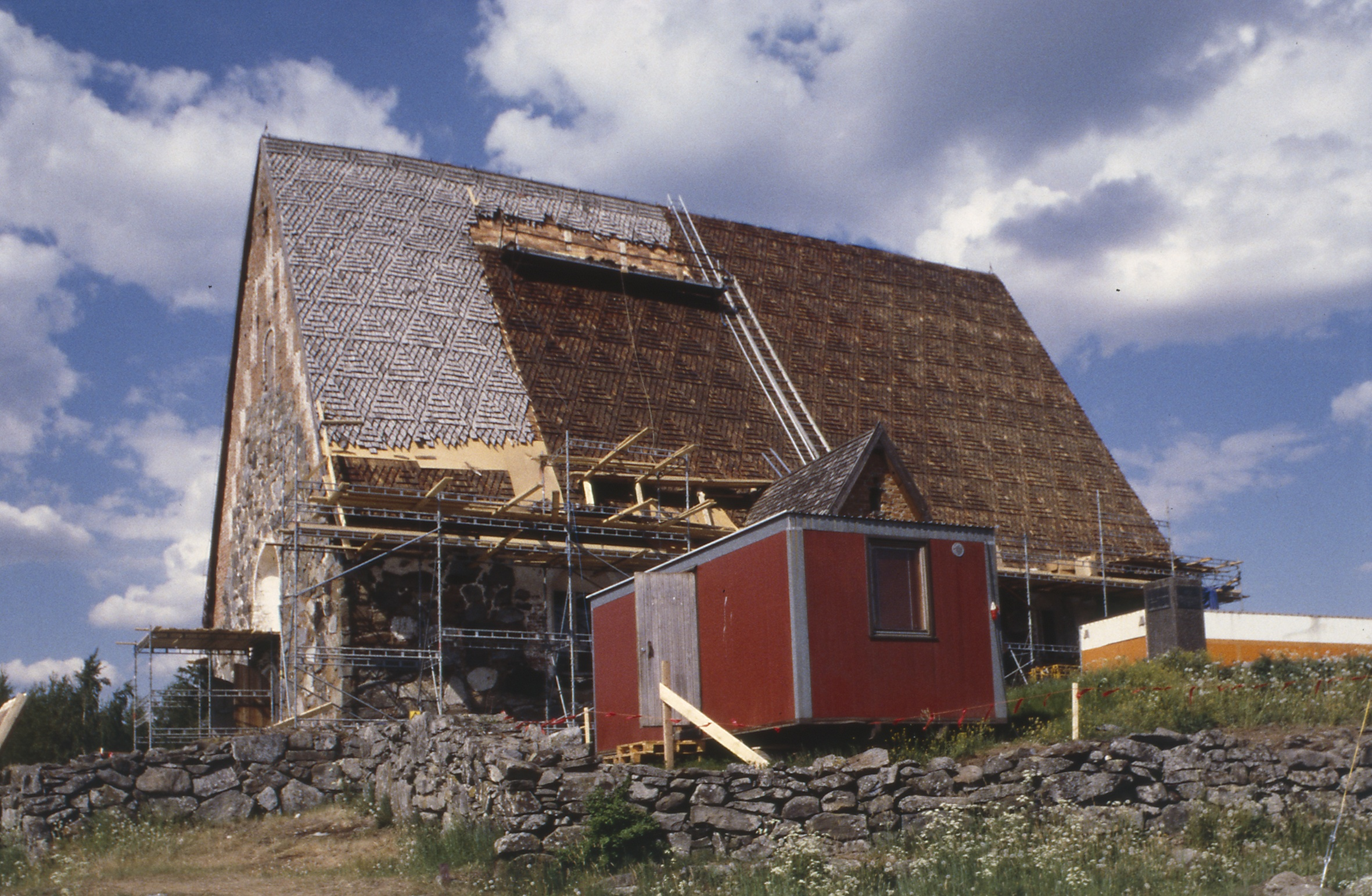 Tyrvään Pyhän Olavin kirkon paanutöitä vuodelta 1997.